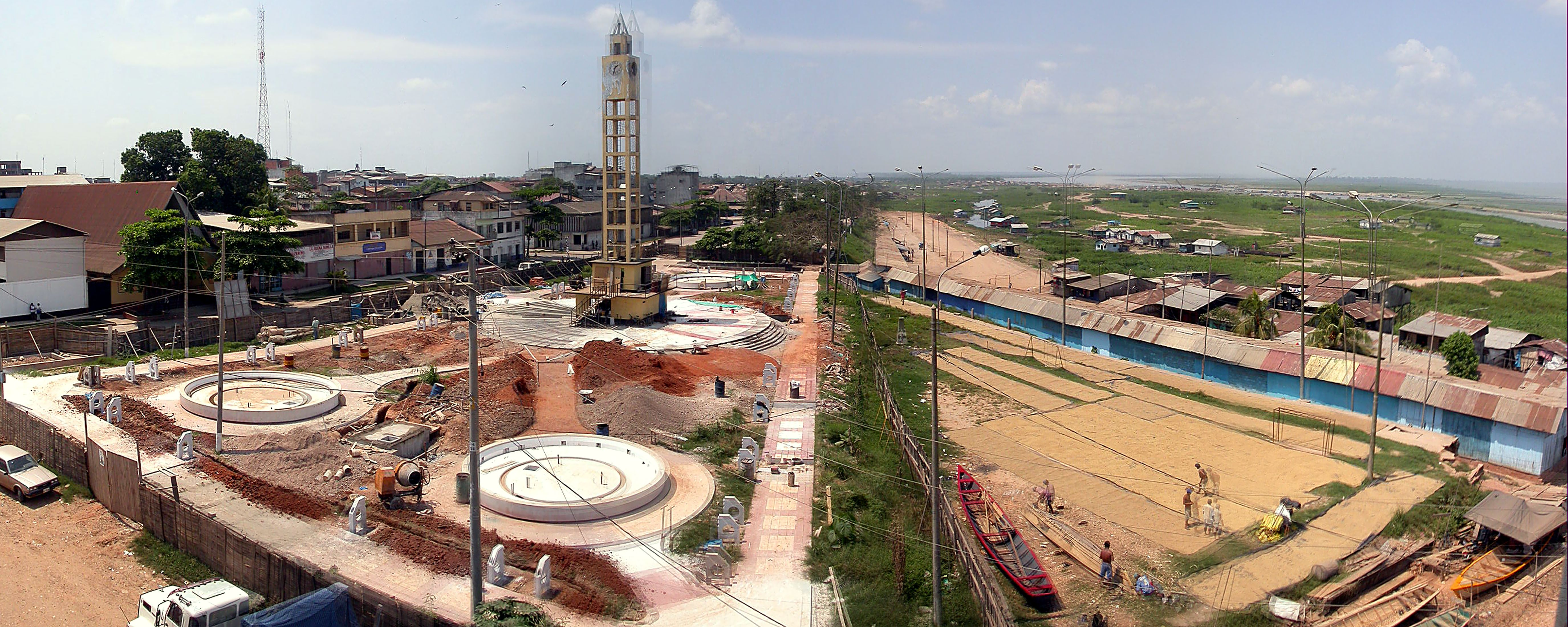 Re-construcción de la plaza Grau (Pucallpa, Perú), ejecutada por la Municipalidad Provincial de Coronel Portillo el año 2004.